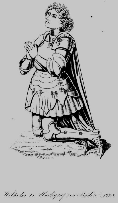 Markgraf Wilhelm von Hachberg-Sausenberg (1406-1482)